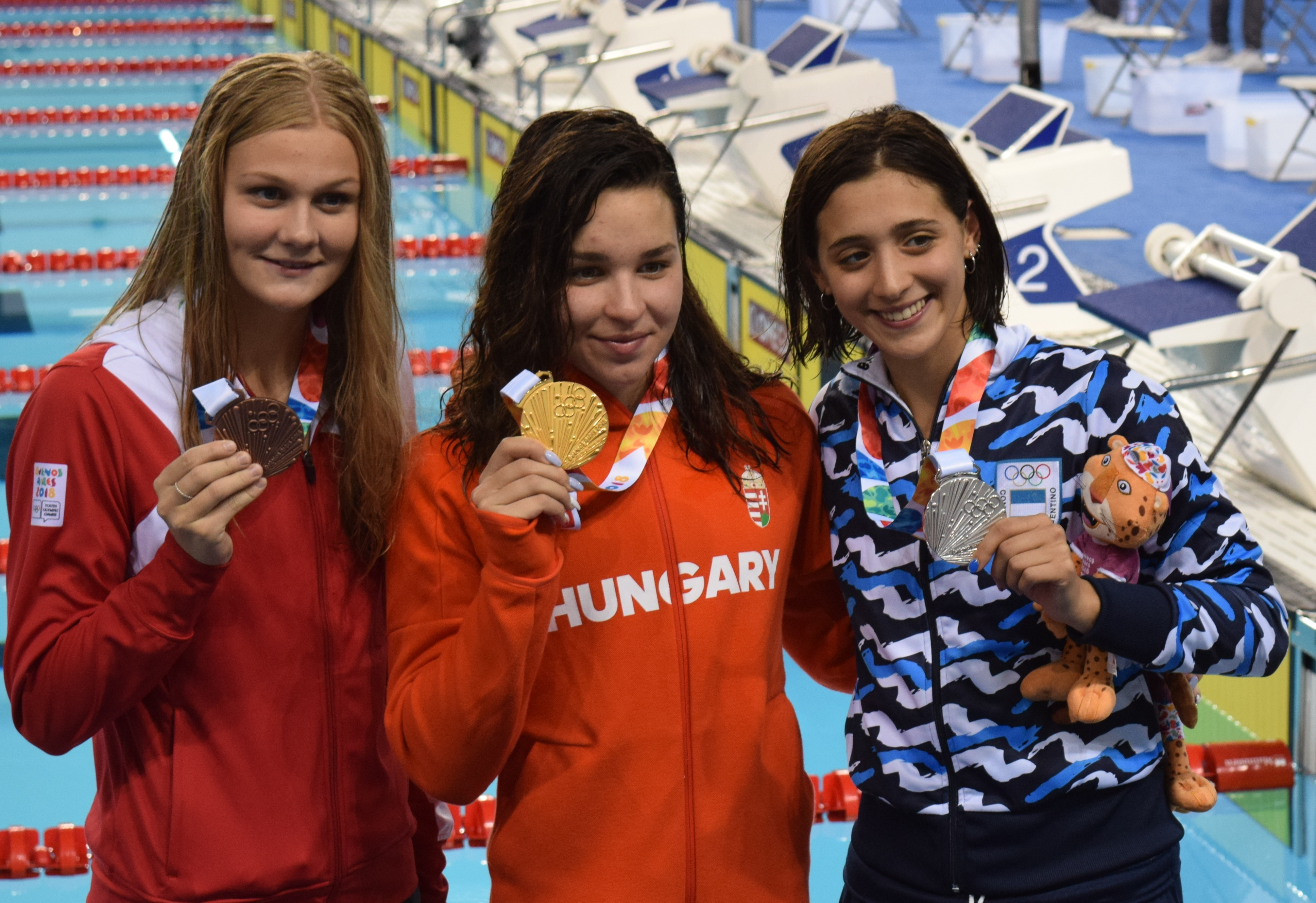 Finales de natación , durante los Juegos Olímpicos de la Juventud 2018 en Buenos Aires. Tarde del 12 de octubre. Marlene KAHLER, Ajna KESELY y Delfina Narella PIGNATIELLO.